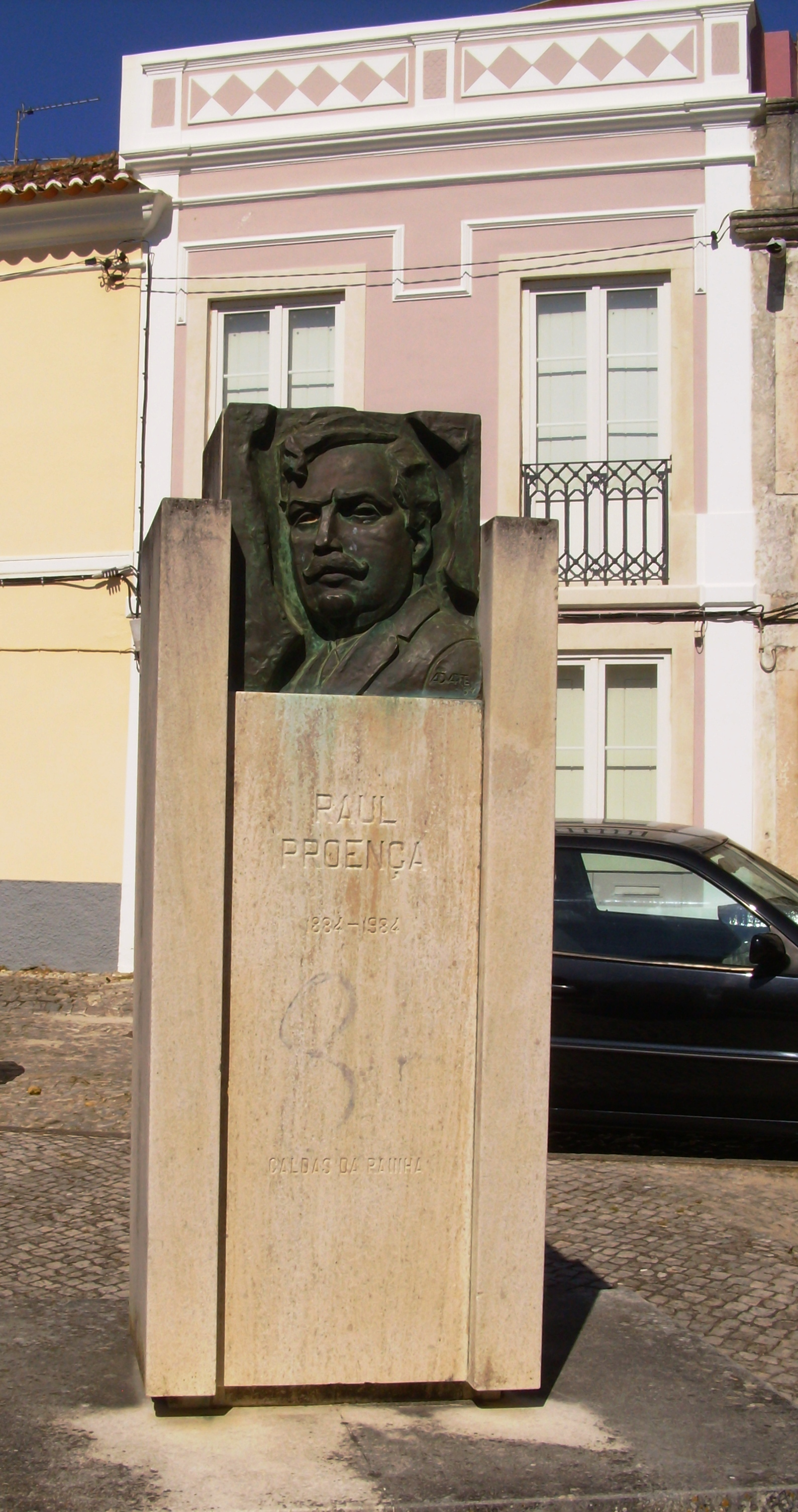 Monumento em homenagem a Raúl Proença, Caldas da Rainha, Distrito de Leiria, Portugal.